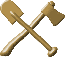 Союз Советских Социалистических Республик/Советский Союз/СССР Вооруженные силы Рабоче-Крестьянская Красная Армия (РККА) Знаки различия образца 1943г., Эмблема дорожных войск Первичный источник: *Приказ Народного комиссара обороны СССР №310 от 12 ноября 1943г. Вторичный источник: Харитонов О.В. Иллюстрированное описание обмундирования и знаков различия Советской Армии (1918–1958), АИМ, Л., 1960.